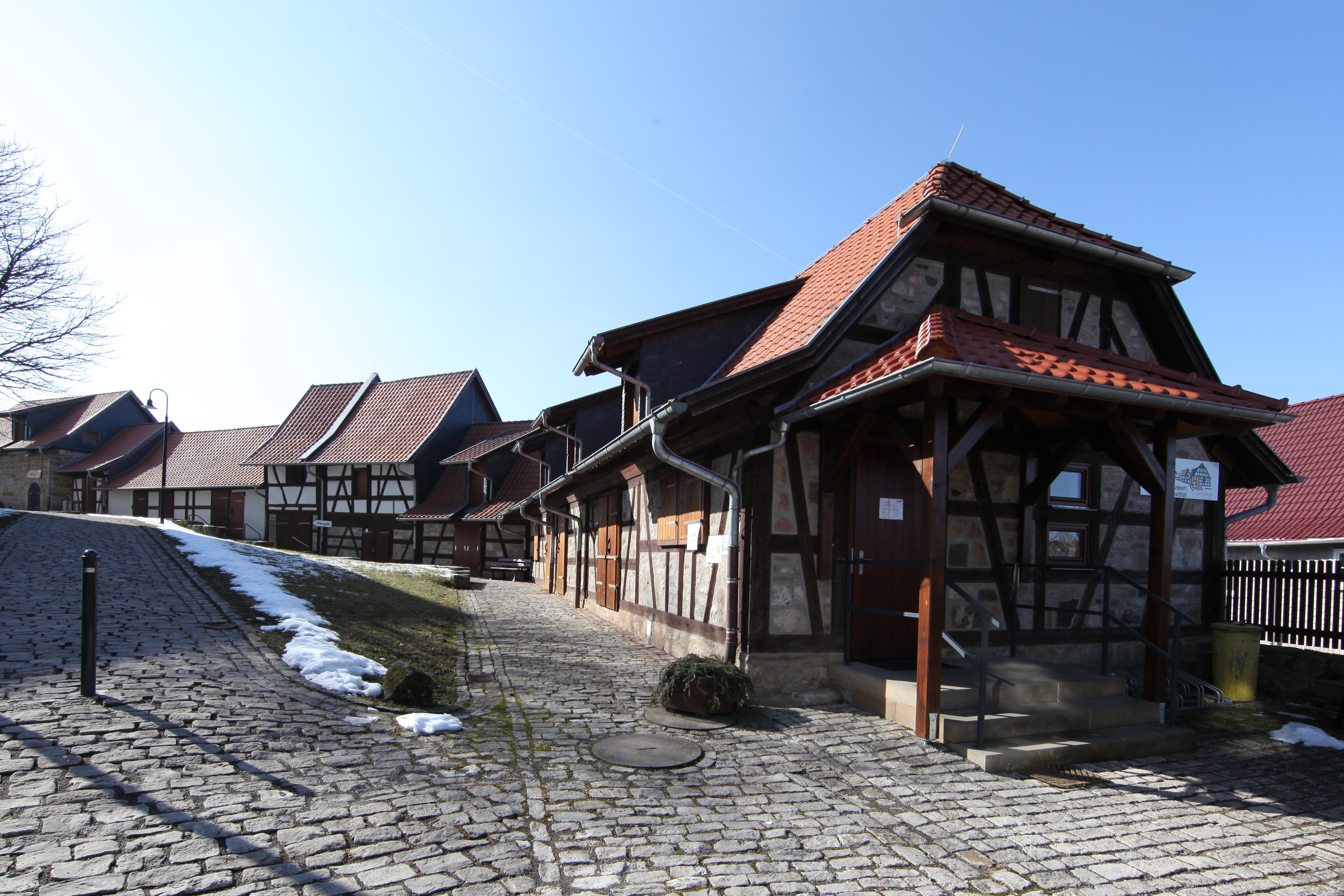 Zweiländermuseum in Streufdorf, OT von Straufhain, Landkreis Hildburghausen